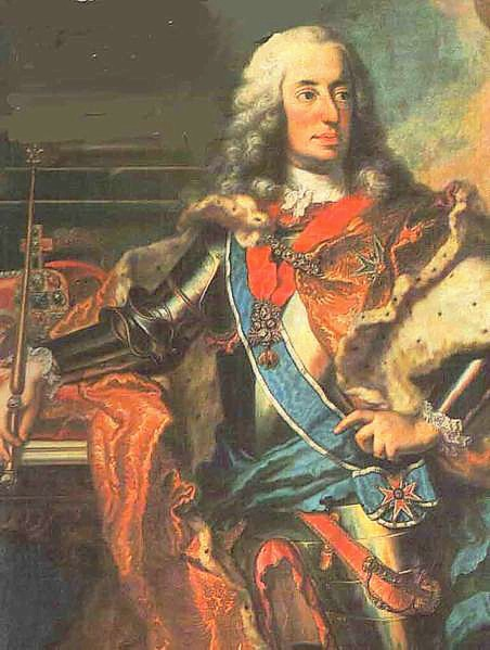 detail